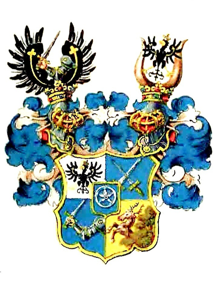 Wappen derer Edler von Graeve, Diplom vom 2. Oktober 1786